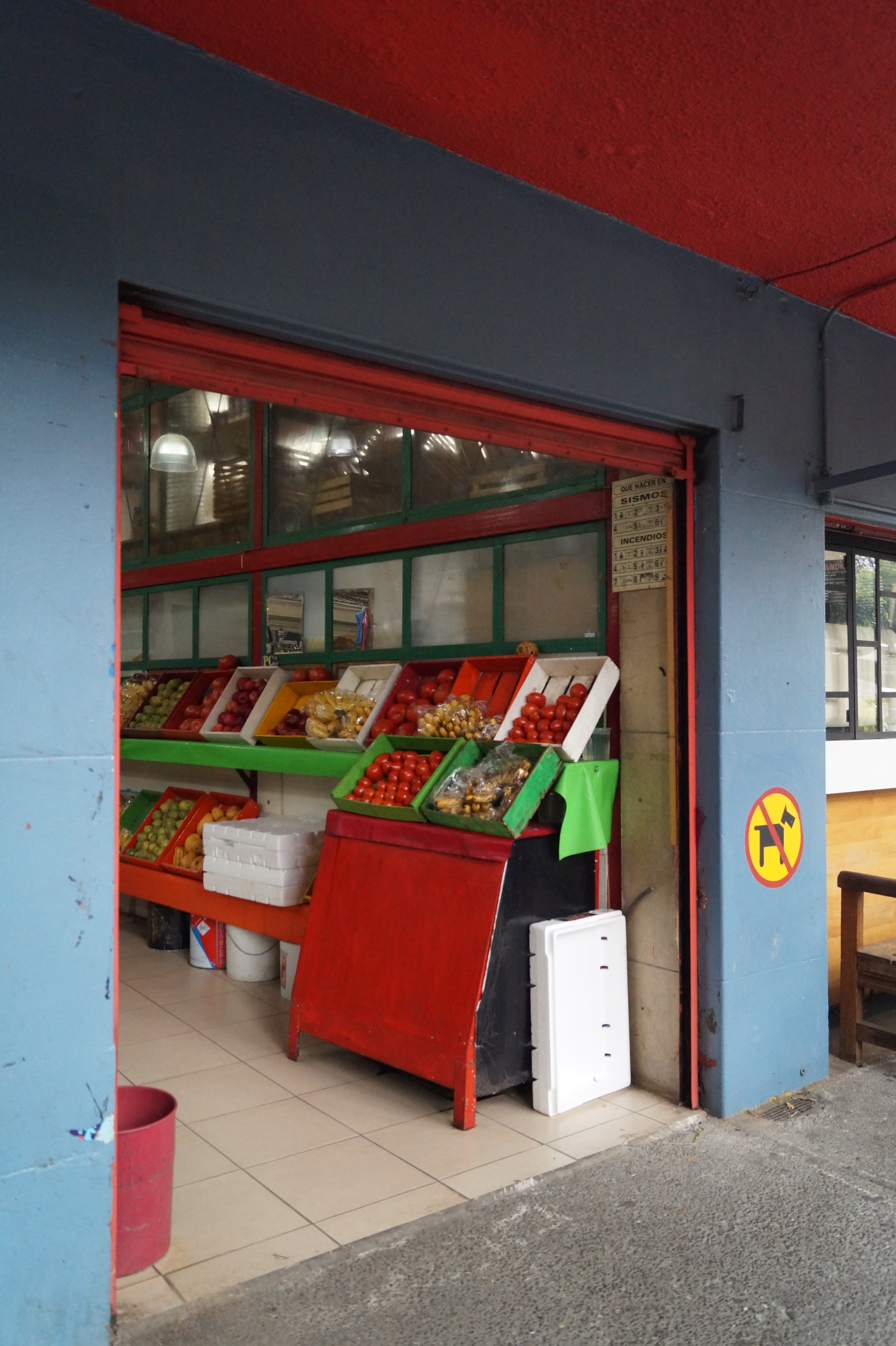 Diversidad en Vegetales frescos y maduros, con una presentación organizada para la atracción visual del cliente en el Mercado Michoacán, Colonia Condesa, México.